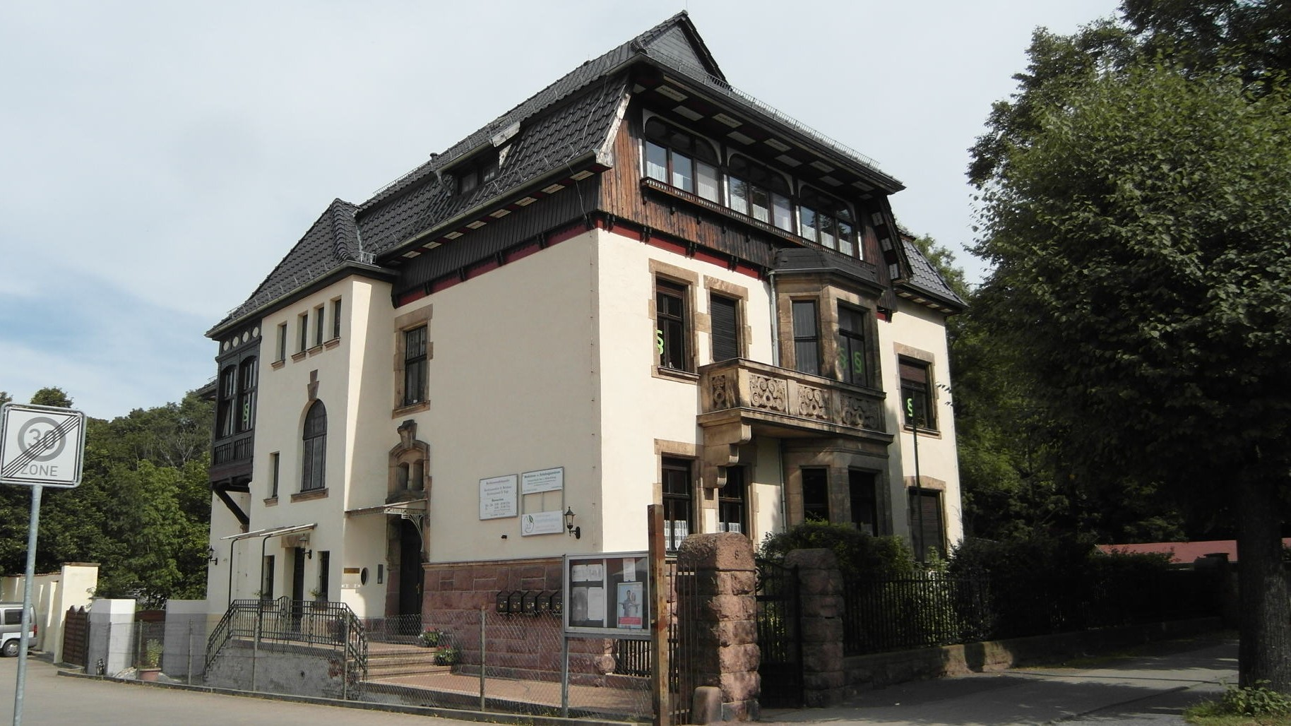 Zugehörige Fabrikantenvilla in der Stresemannstraße 8, Quedlinburg